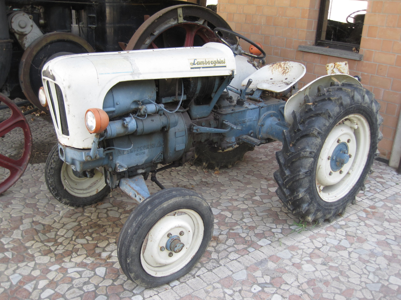 Automobiles in Panini Maserati Museum in Modène - Tracteur Lamborghini